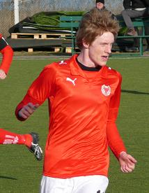 Rasmus Elm